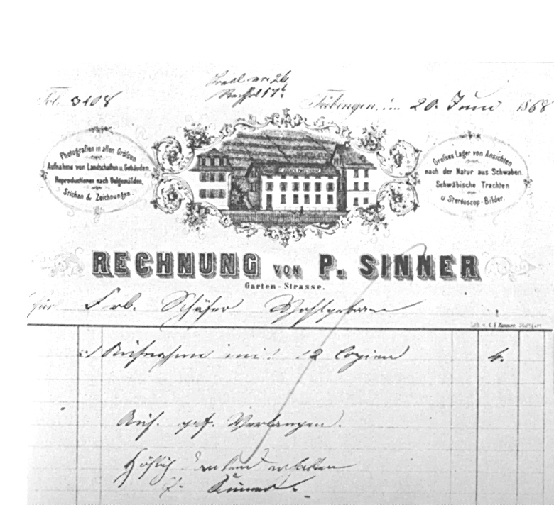 Rechnung auf lithographiertem Formular Paul Sinners mit der Abbildung des Ateliers